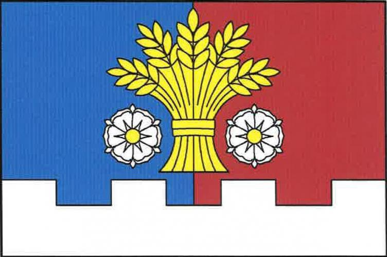 vlajka, Úlibice, okres Jičín